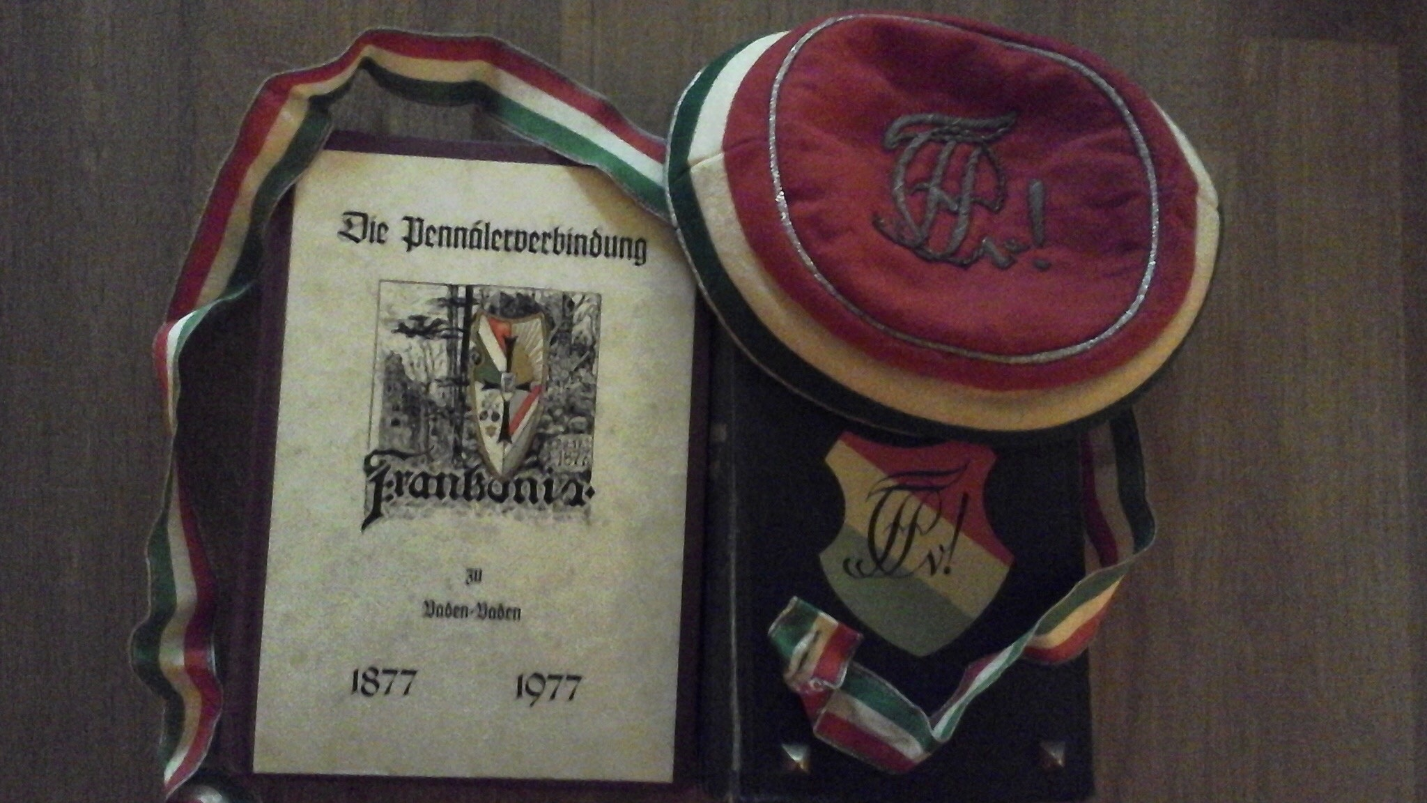 Band, Tönnchen, Kommersprügel und Frankenchronik der PV Frankonia